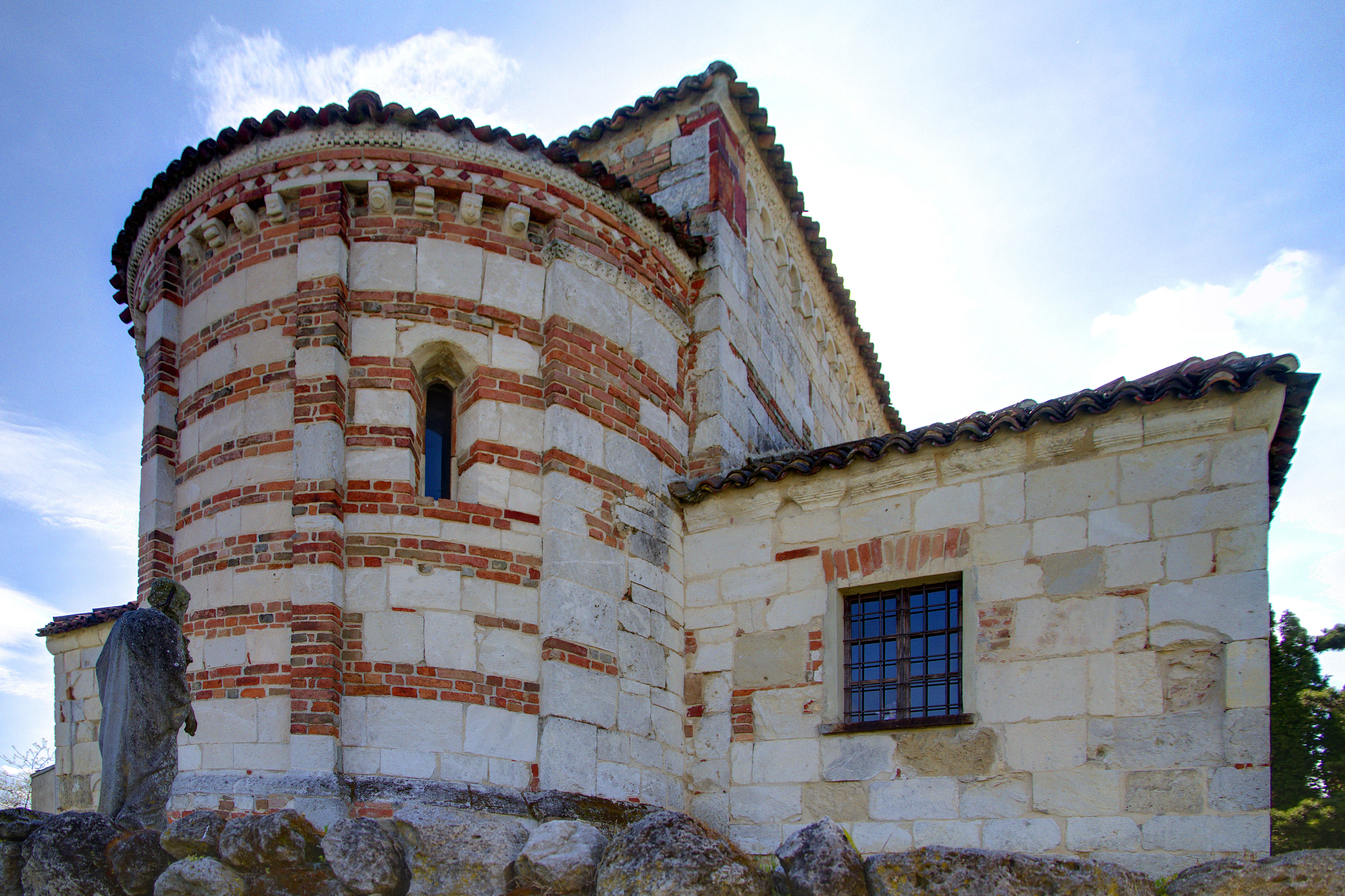 Montiglio Monferrato (AT) - Pieve di San lorenzo (XII secolo)- Italia.